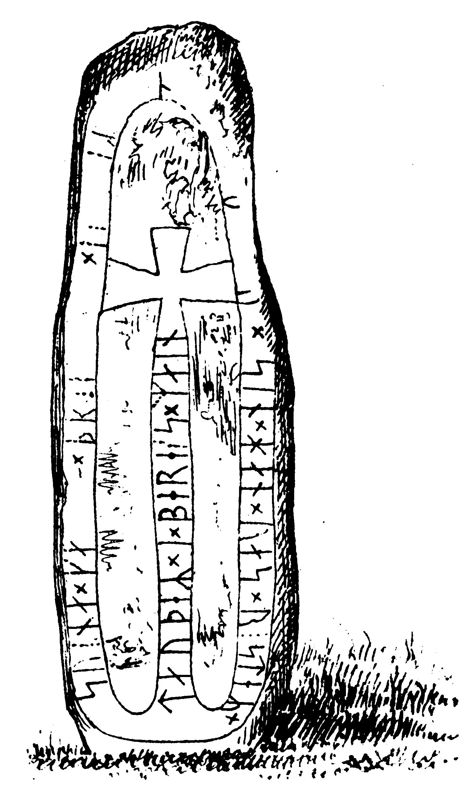 Östergötlands runinskrifter 68 vid Ekeby kyrka i Östergötland. Teckning i "Utdrag af Antiqvitets-Intendenten P. A. Säves afgifna berättelse för år 1861", publicerad i Antiqvarisk tidskrift för Sverige band 1, 1864.